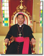 南宁教省总主教若翰谭燕全阁下。